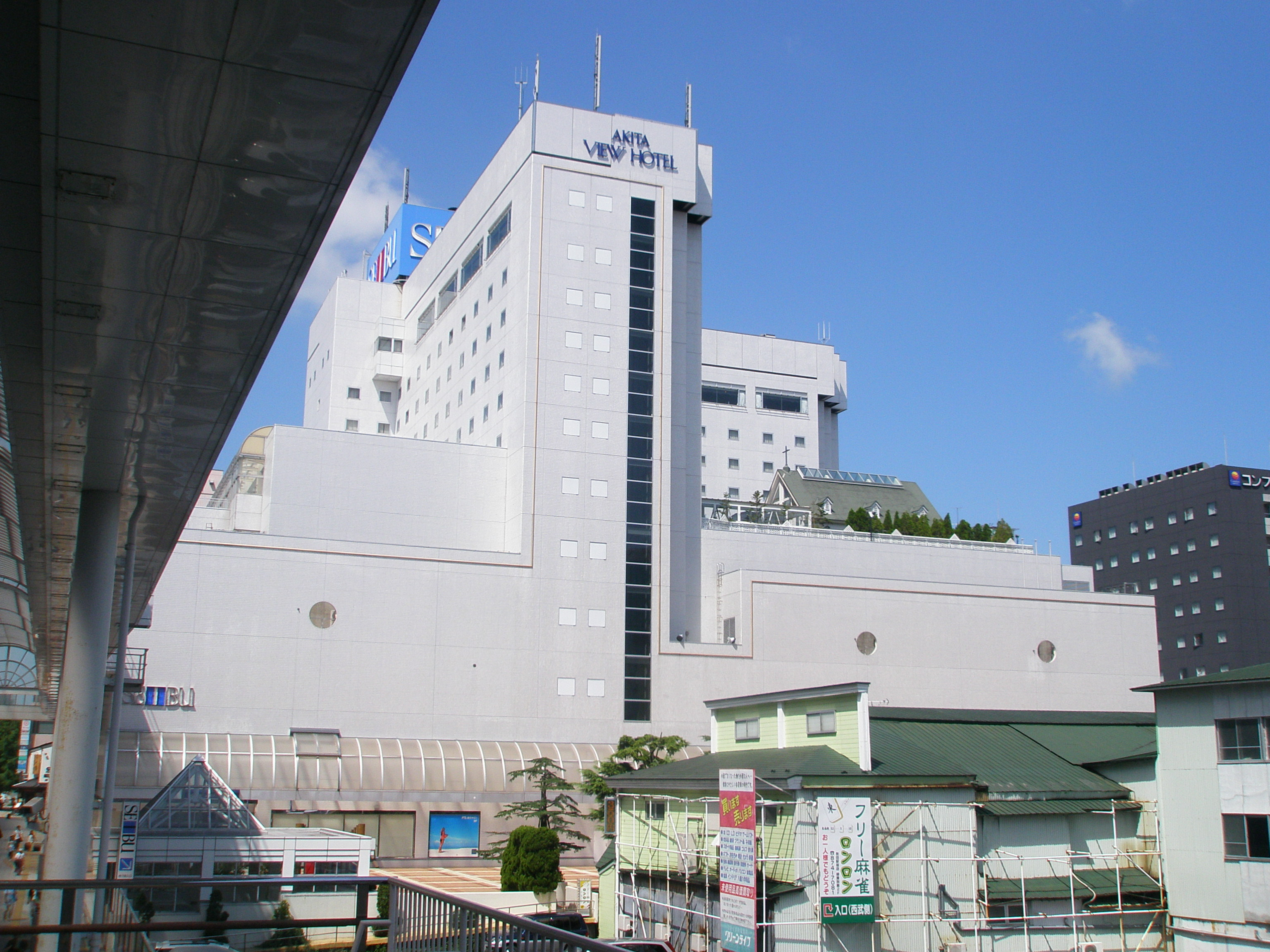 秋田中央ビルディング（秋田ビューホテル・秋田西武）